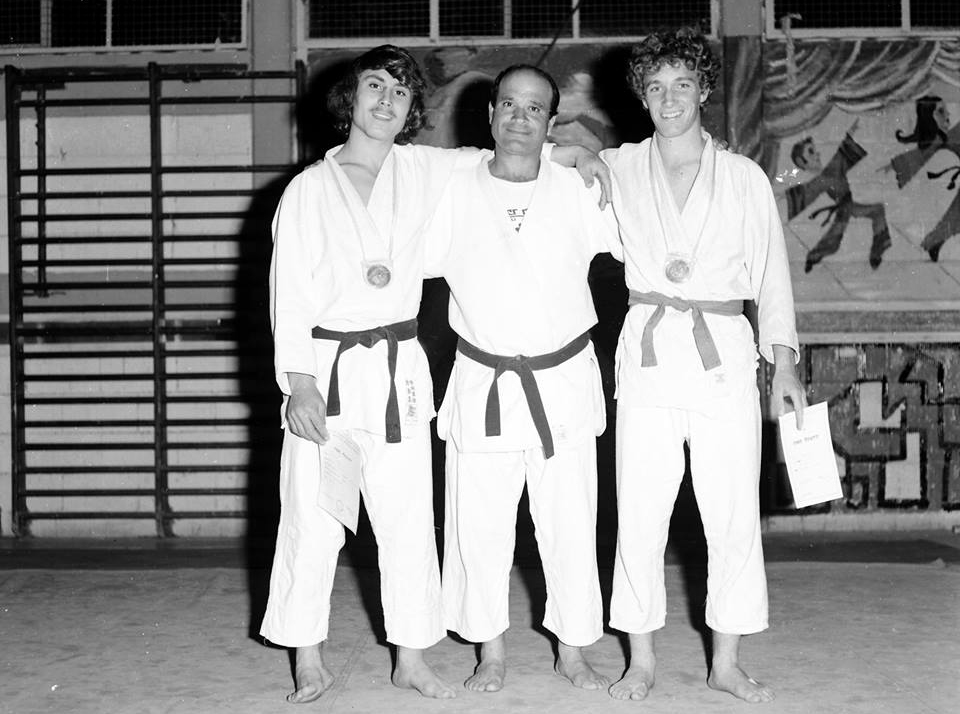 מוריס סמדג'ה וחניכי ג'ודו במועדון הנעורים בבאר שבע